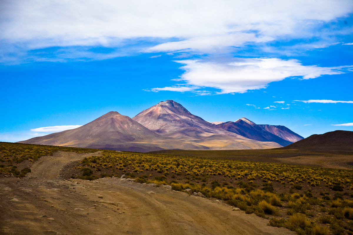 alrededores de la laguna Colorada en Potosí. Bolivia.